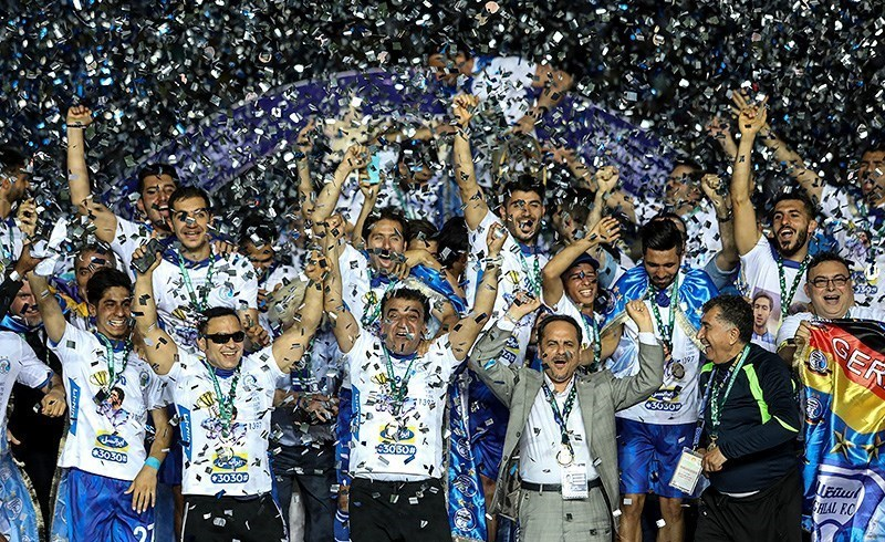 قهرمانی استقلال در فینال جام حذفی